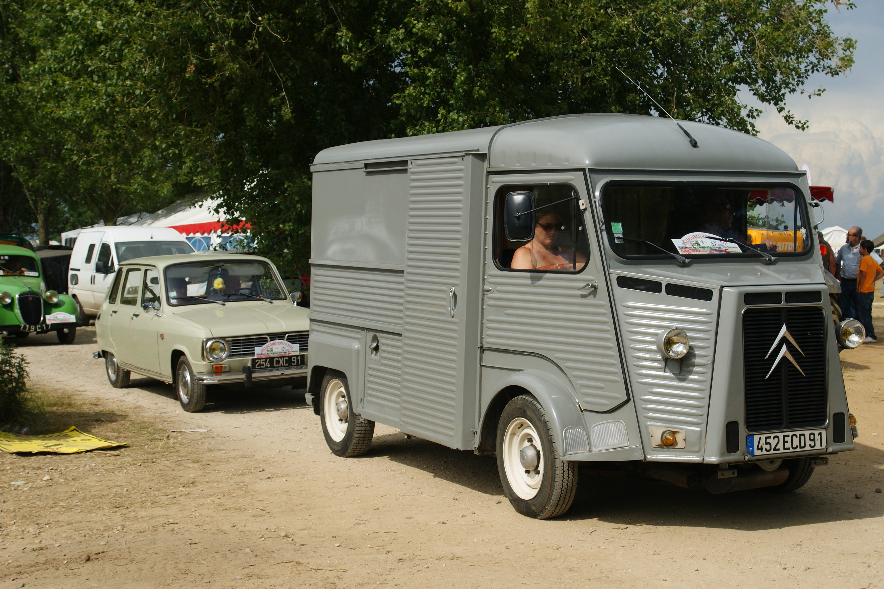 Vue à la Locomotion en Fête